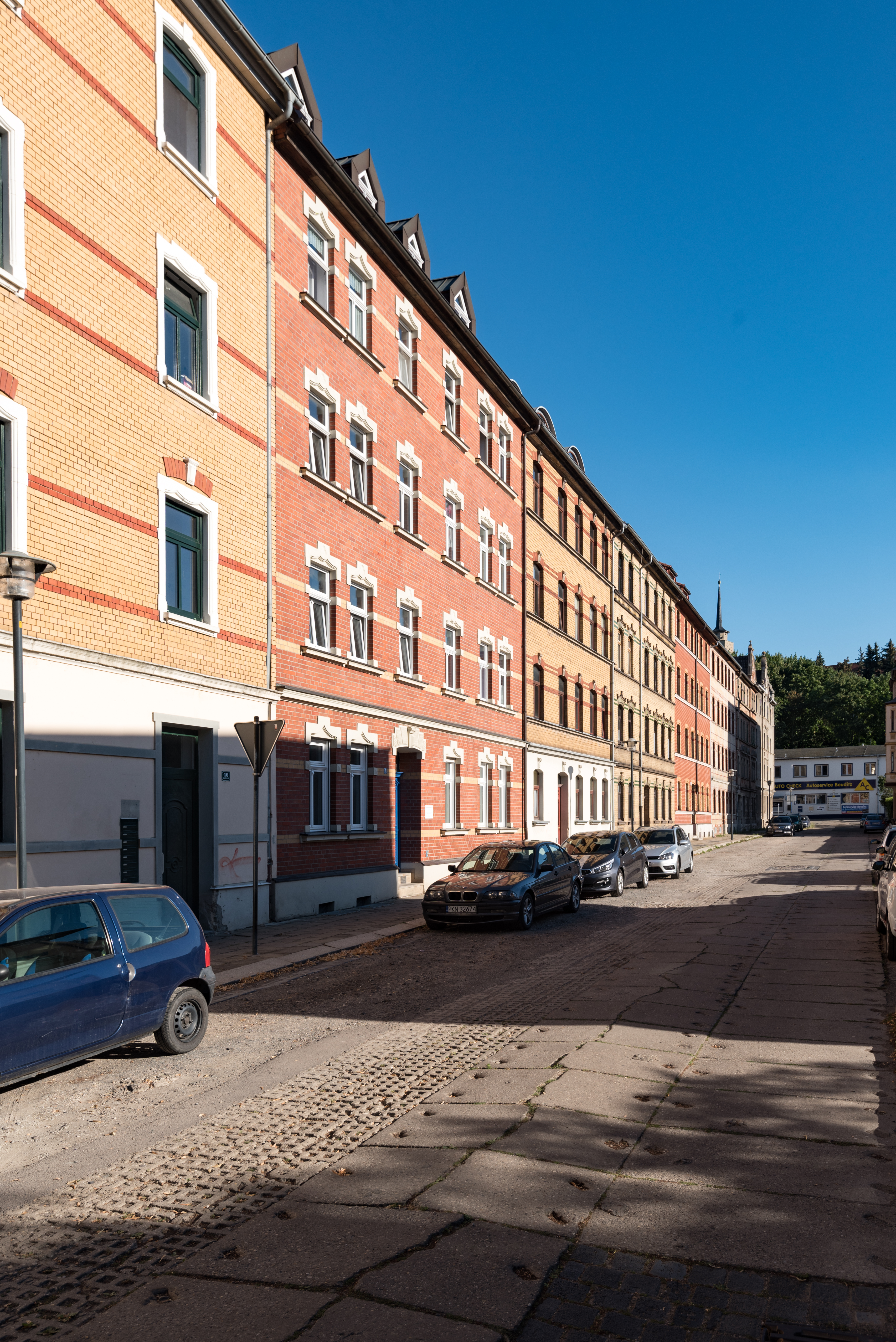 Weißenfels, Ladegaststraße, Ostseite